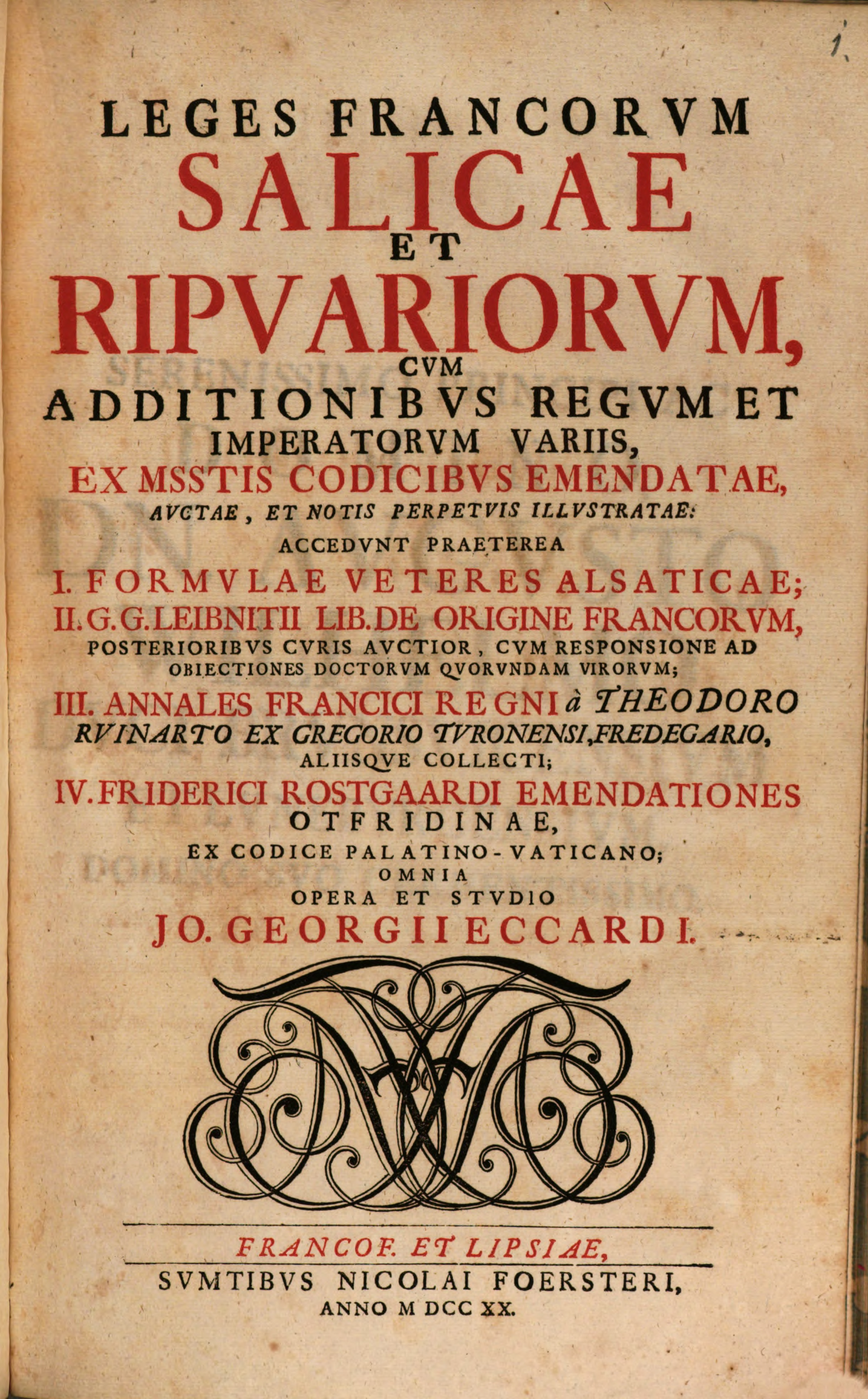 Leges Francorum Salicae et Ripuariorum, cum additionibus regum et imperatorum variis